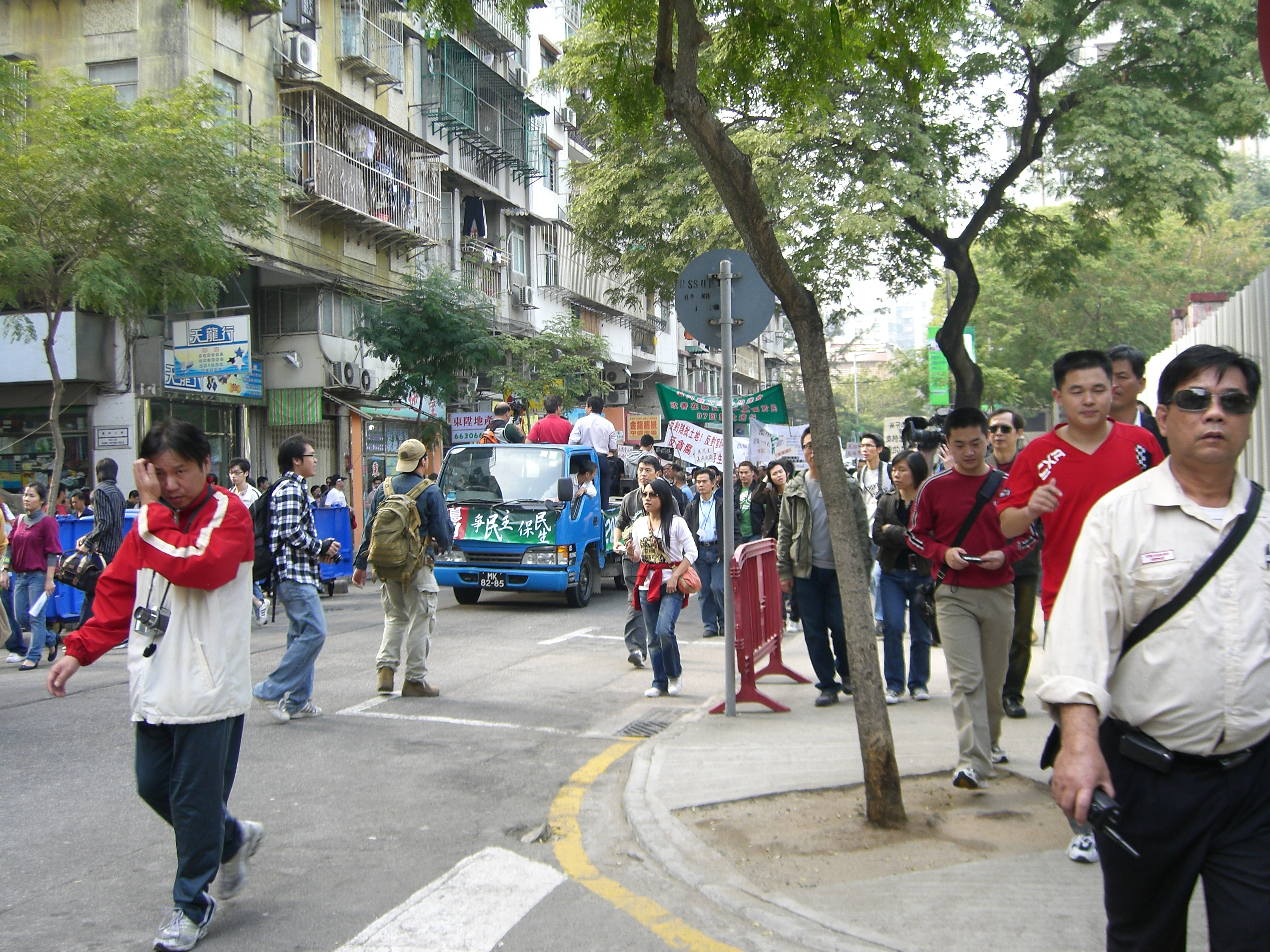 Macau 2007.12.20 demonstration